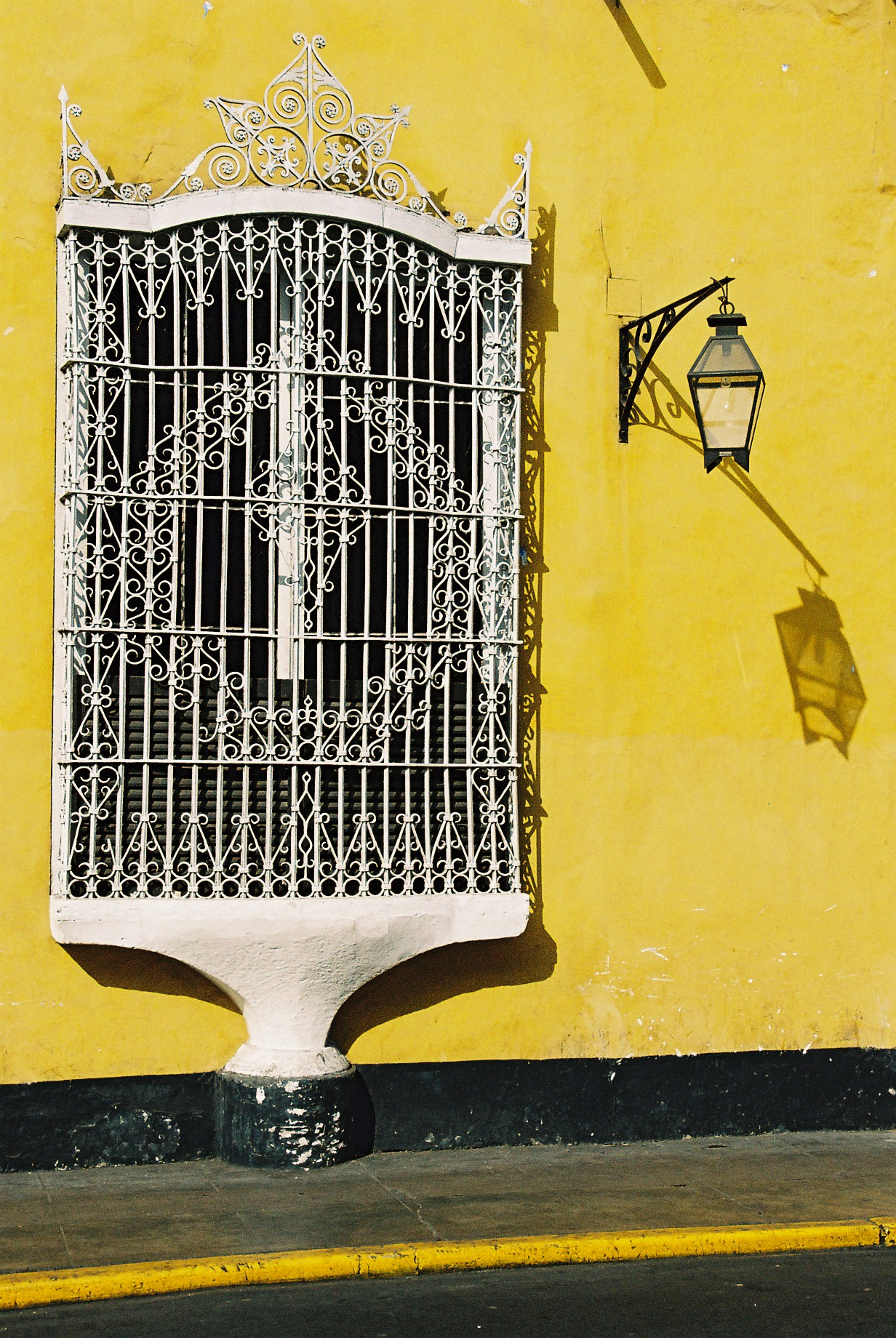 Window in Trujillo/Trujillo/La Libertad, Peru.